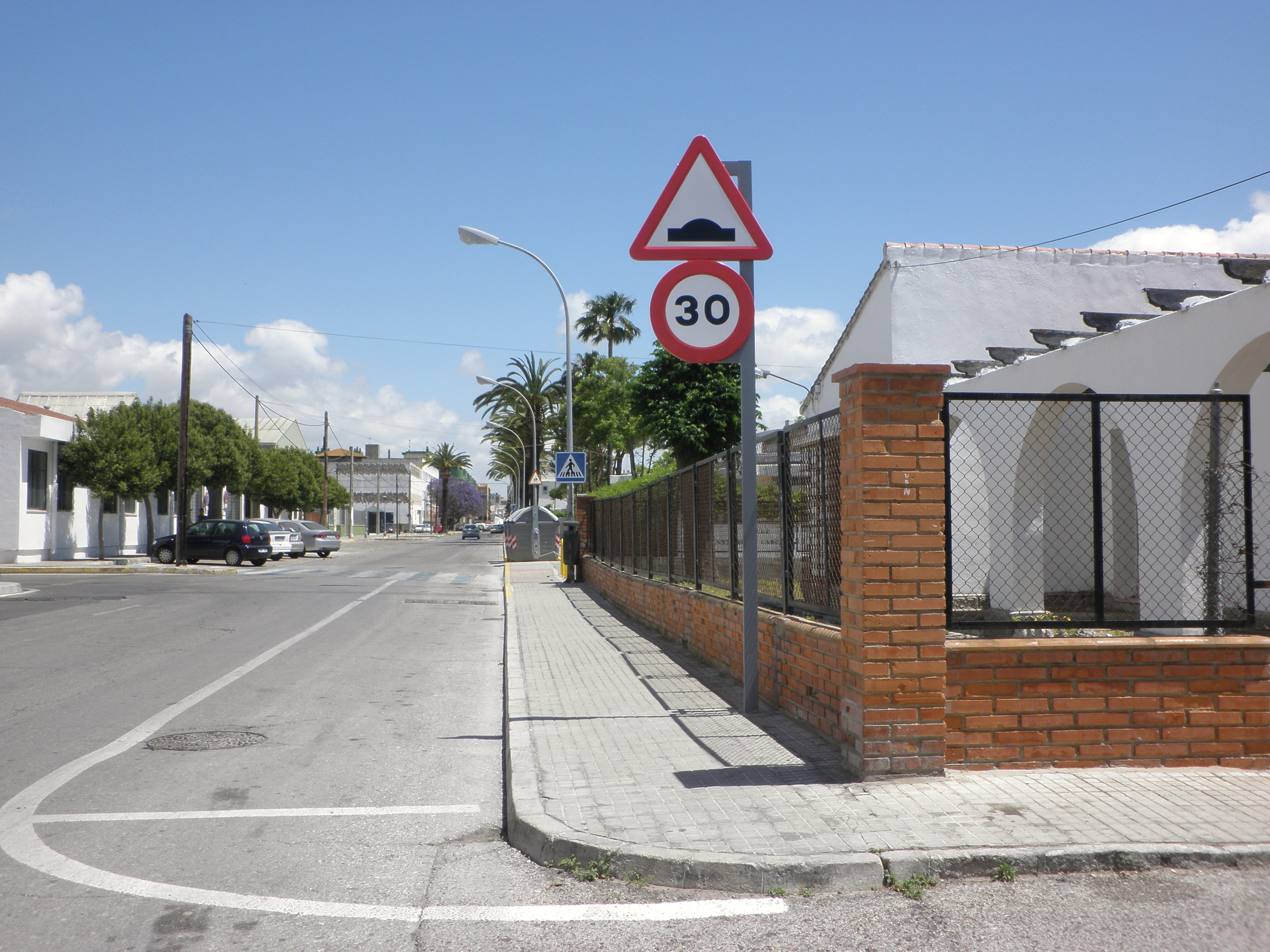 Tramo con resalto en El Puerto de Santa María.